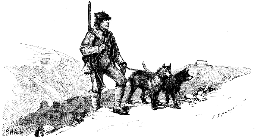 Illustration in "Norska folksagor och huldre-sägner" page 157 (Per Gynt)